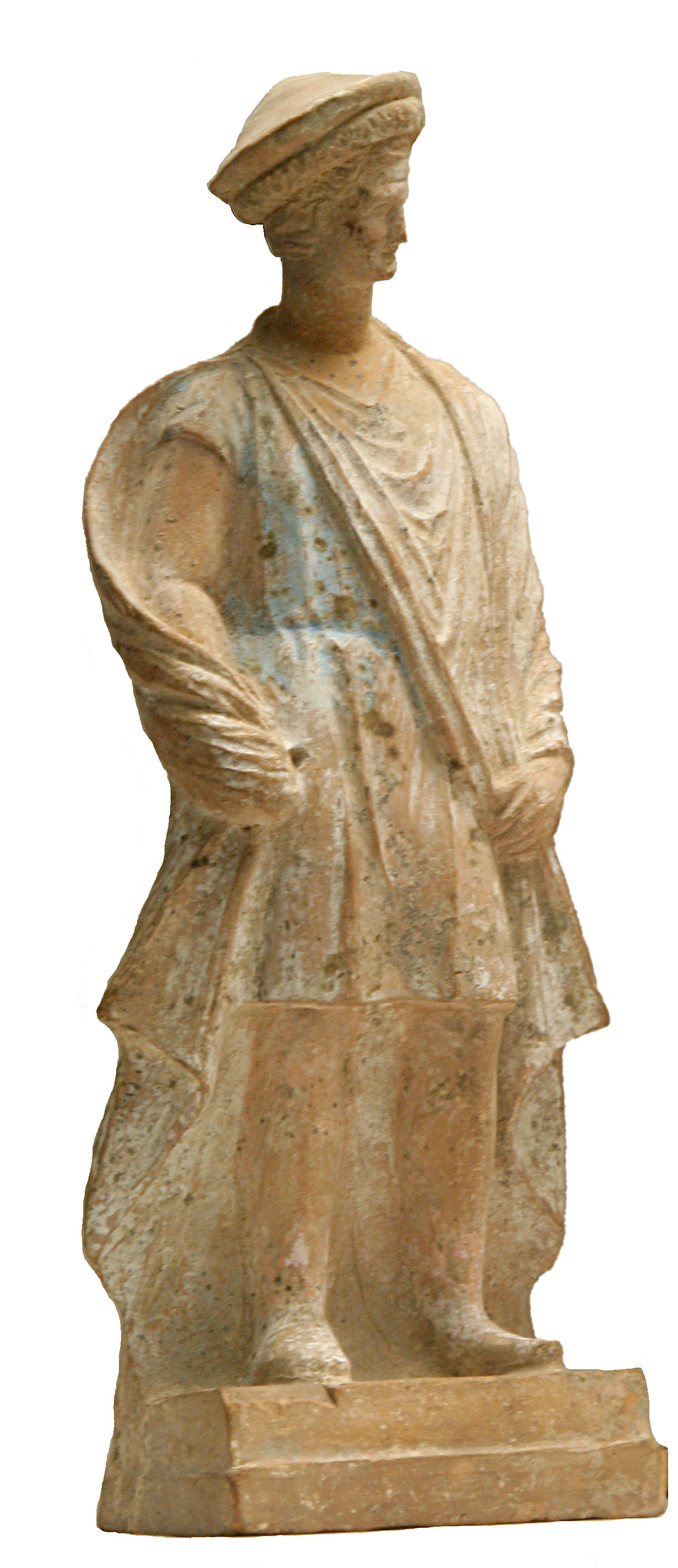 Makedonische Terrakottastatue 3.Jhdt. v.Chr. Kurzer blauer Chiton, Mantel mit Fibel, als Kopfbedeckung eine Kausia, die während des Alexanderfeldzuges aus dem Hindukusch übernommen wurde. Photographed by myself in "Antikensammlung München", Germany.